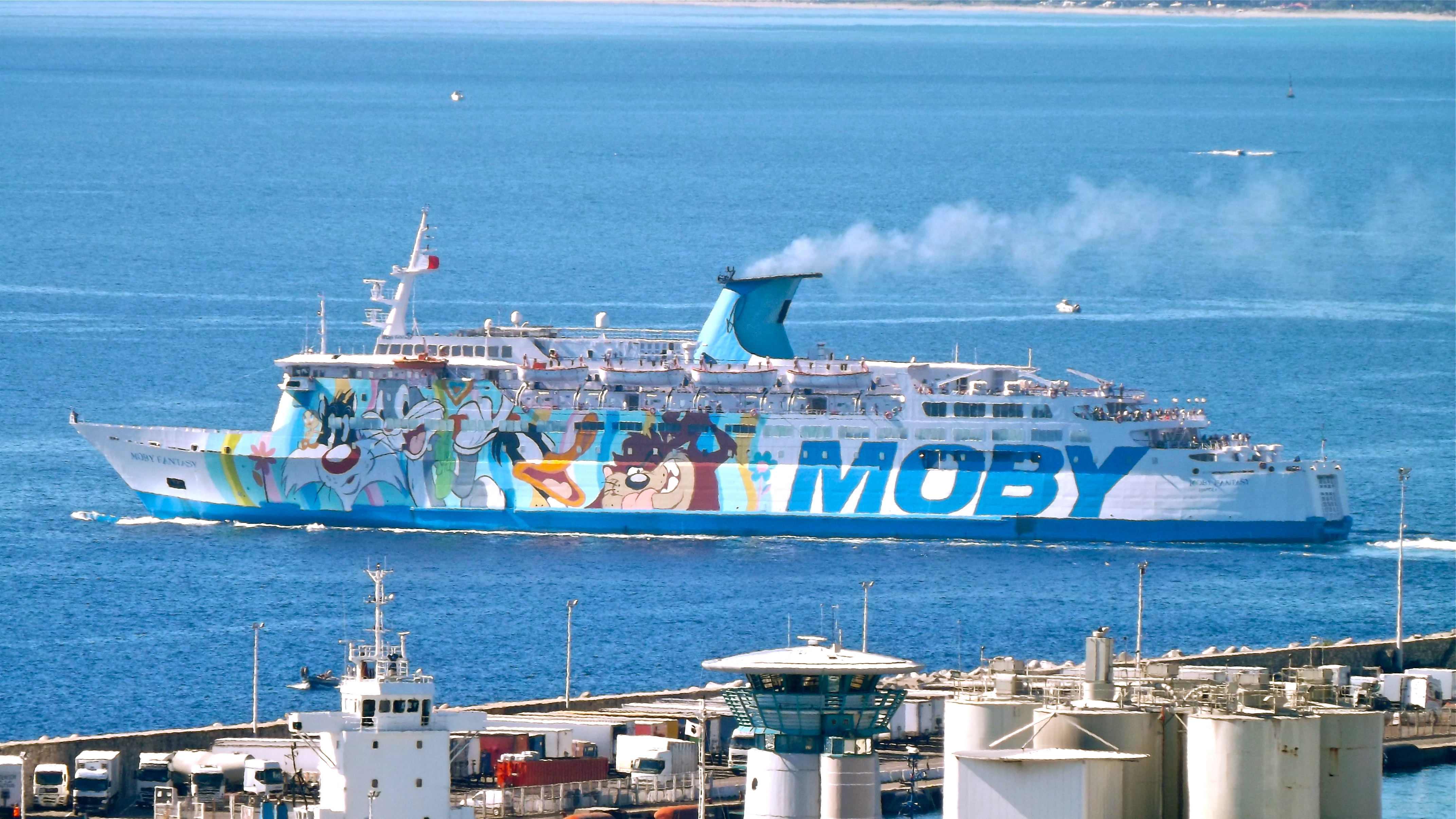 le Moby Fantasy à la sortie du port de Bastia.